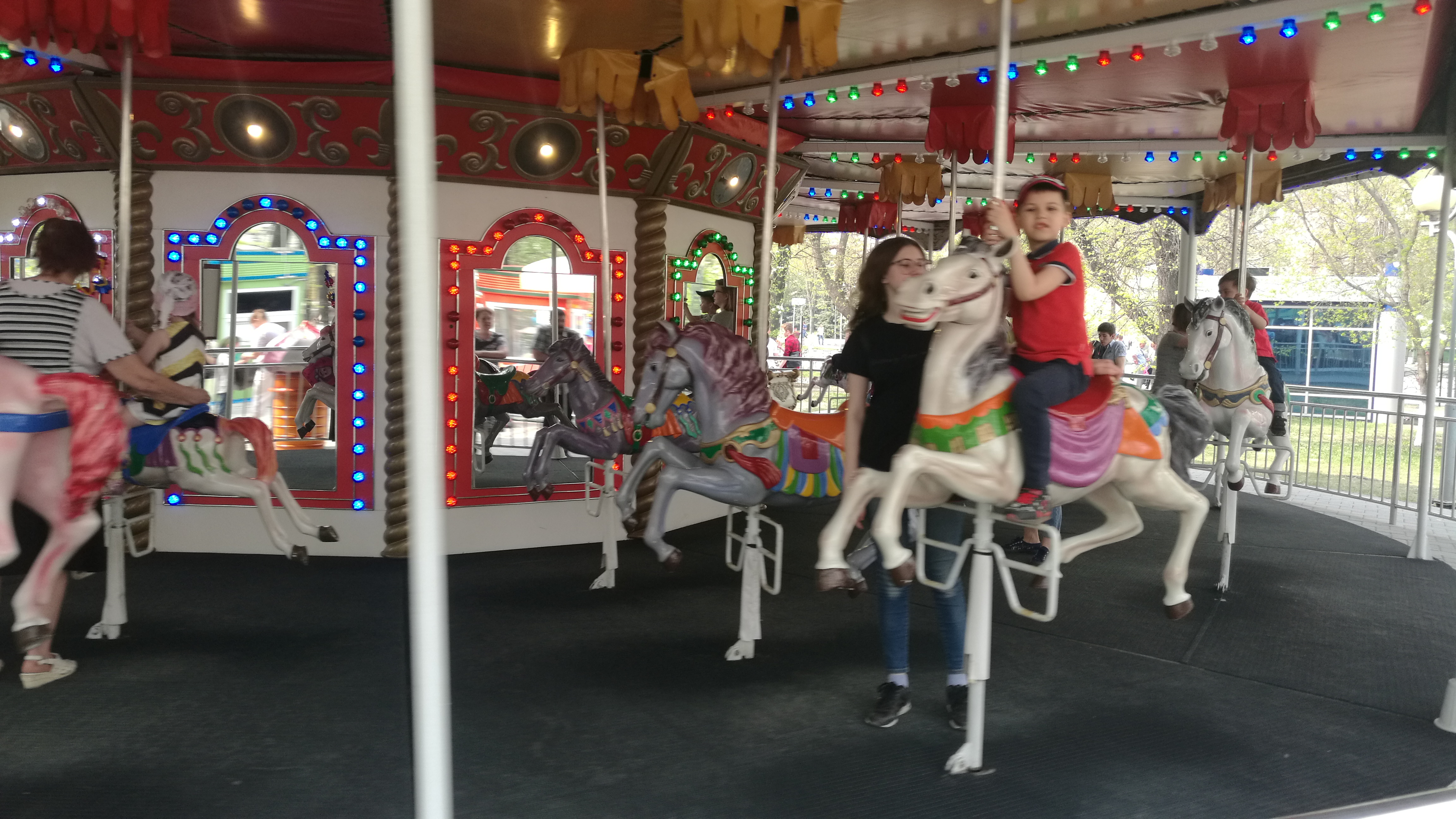 Kolora bulvardo. Tjumeno, Rusio.